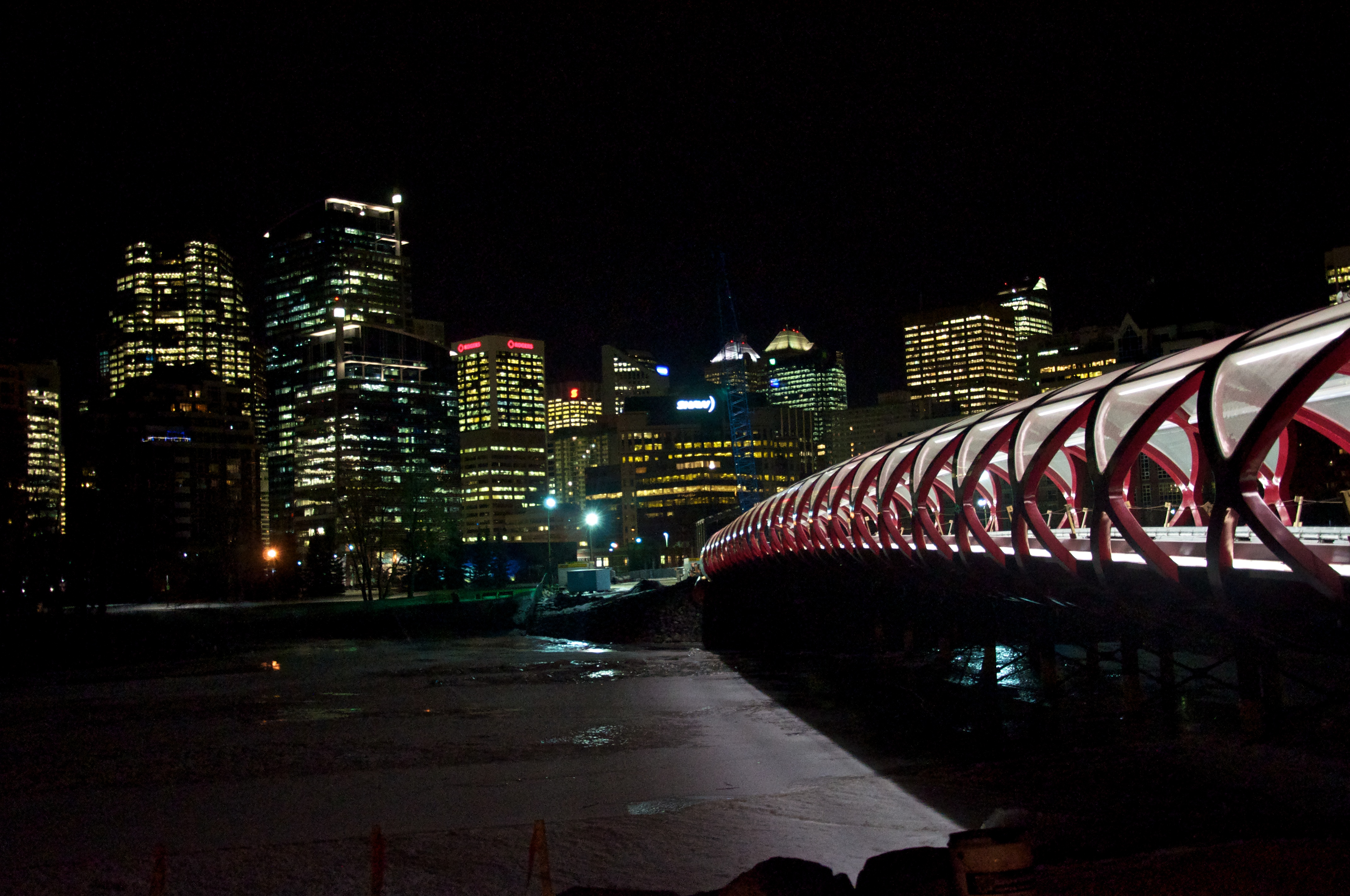 ISO 3200